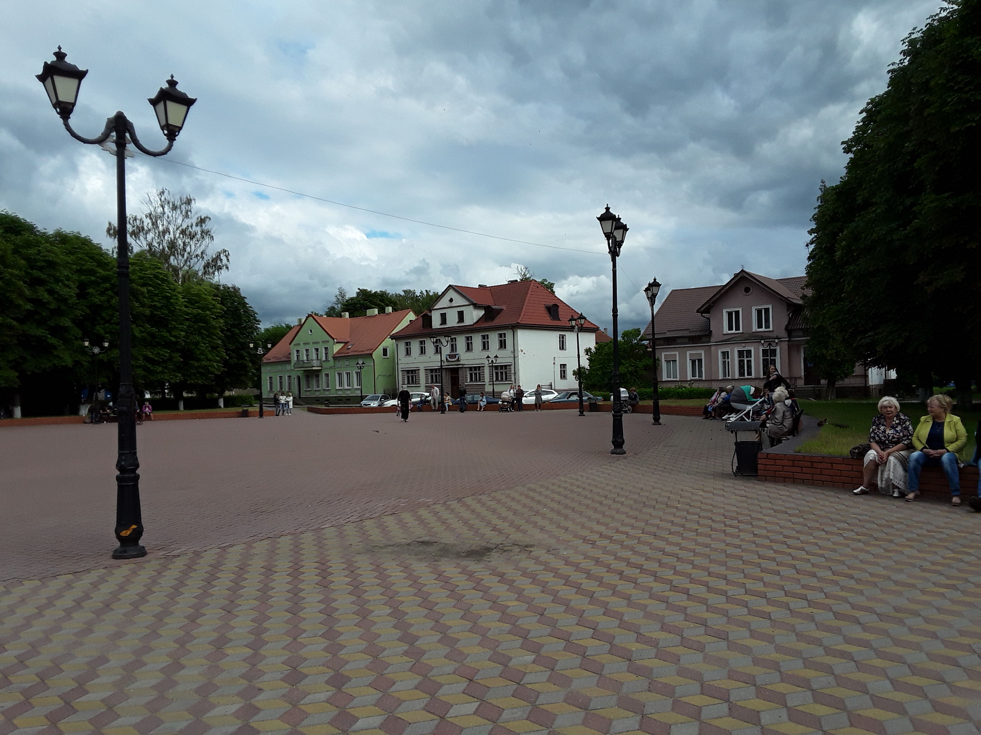 Heinrichswalde, Friedrichstraße